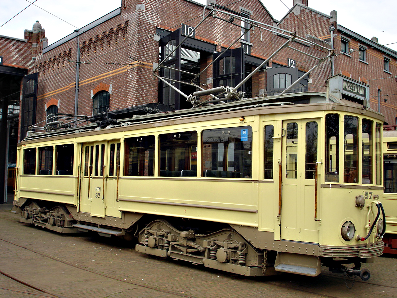 Buitenlijner 57 HOVM Den Haag